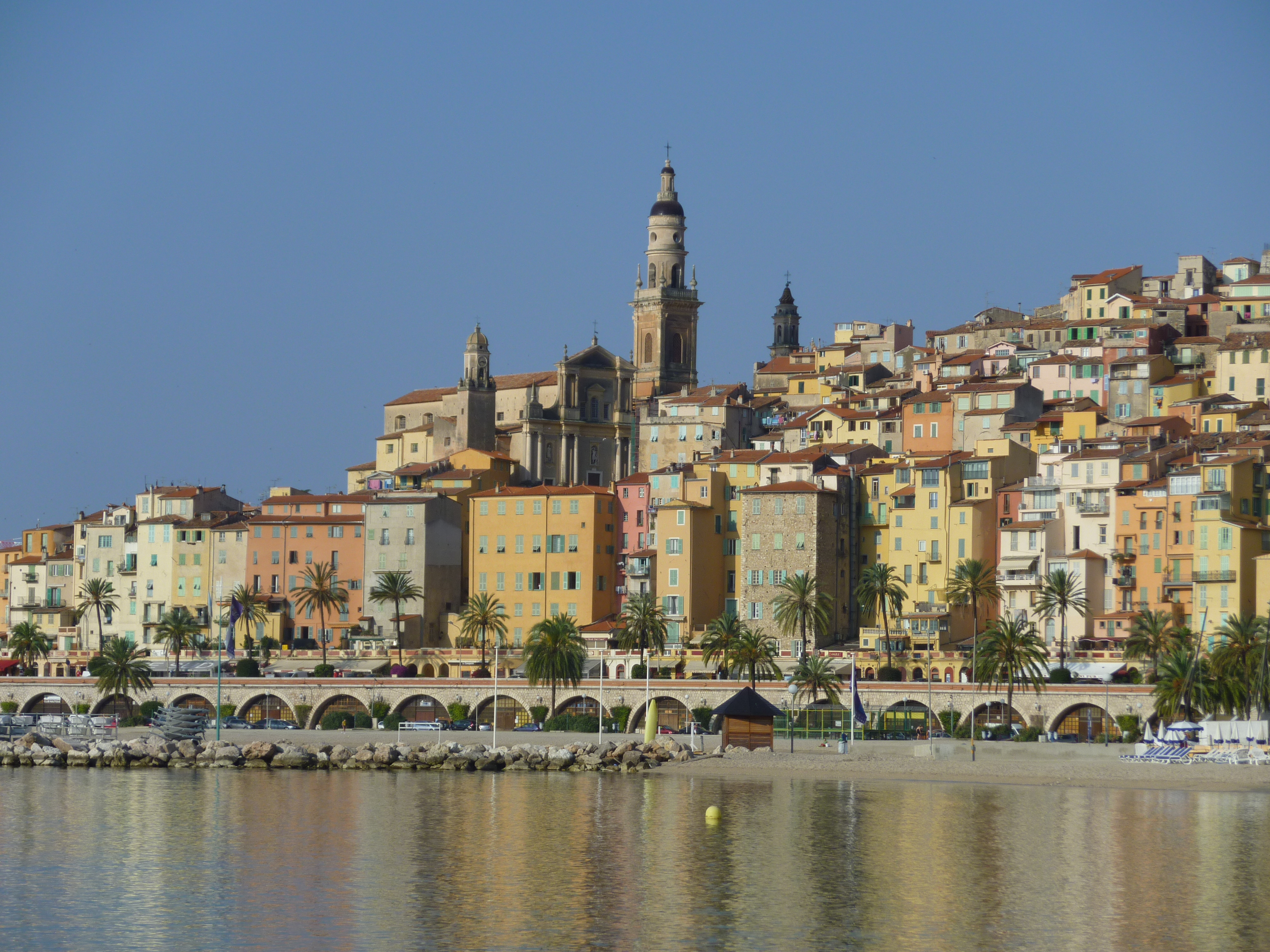 Vue de la vielle ville de Menton. On distingue l'église Saint-Michel et l'hôtel Pretti. Alpes-Maritimes, France. This building is indexed in the Base Mérimée, a database of architectural heritage maintained by the French Ministry of Culture, under the references PA00080762 and PA00080935 .